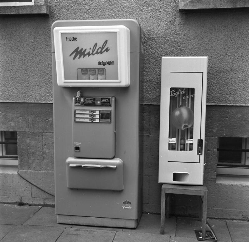 Apfel-Automaten im Bundesministerium für Ernährung